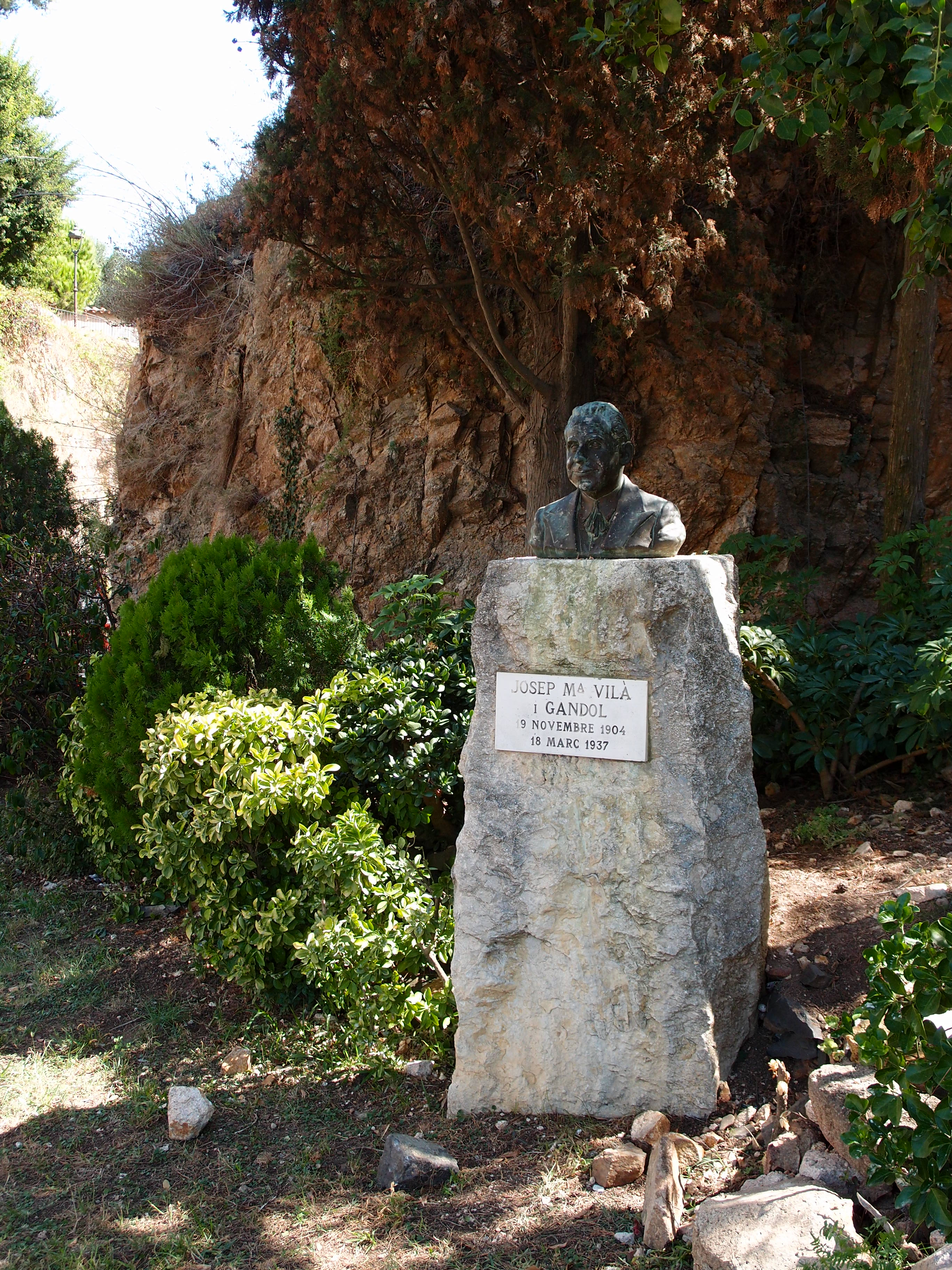 Denkmal für Josep Maria Vilà i Gandol, Sardana-Komponist, Sant Feliu de Guíxols Datum: 22.09.2011 Urheber: M. Pfeiffer alias Benutzer:Gordito1869 Quelle: Privates Fotoarchiv des Urhebers